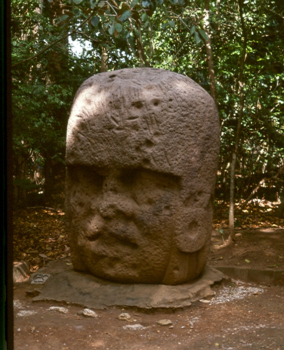 Colossal Head 3 La Venta Mexico image personnelle (1991)